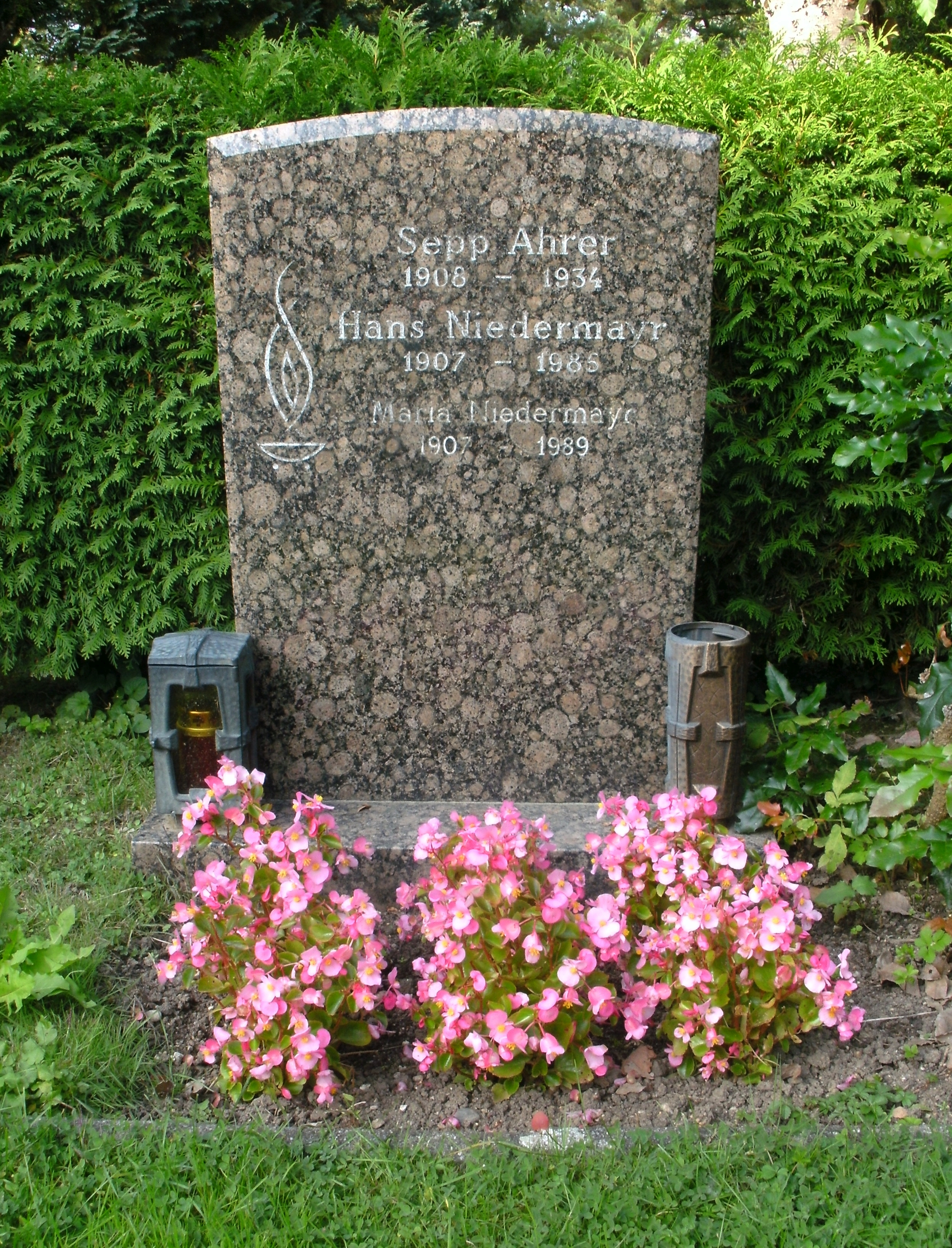 Urnenfriedhof am Tabor - Grab von Josef Ahrer (* 30. August 1908; † 17. Februar 1934 in Steyr), ein Sozialdemokrat, der als einziger Beteiligter der Februarkämpfe in Steyr zum Tod verurteilt und hingerichtet wurde.